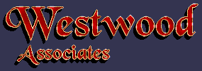 Historisches Logo des Computerspielentwicklers Westwood Studios